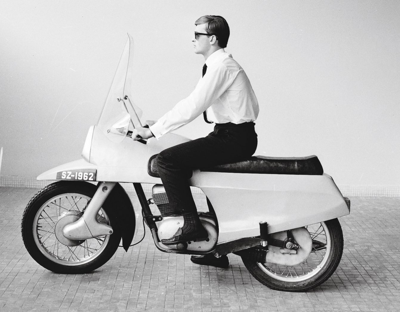 Junak M14 - projektant Józef Kandefer